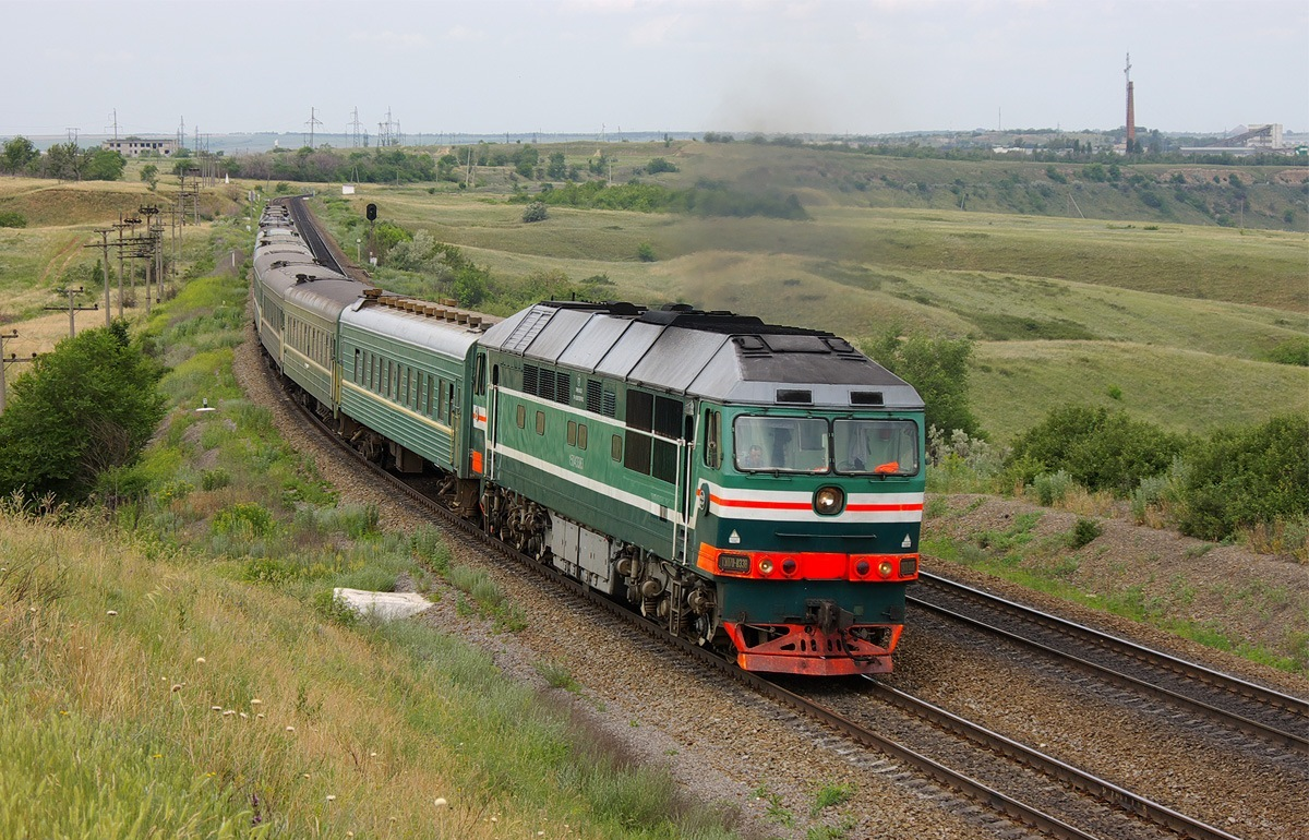 Тепловоз ТЭП70-0338 под Белой Калитвой